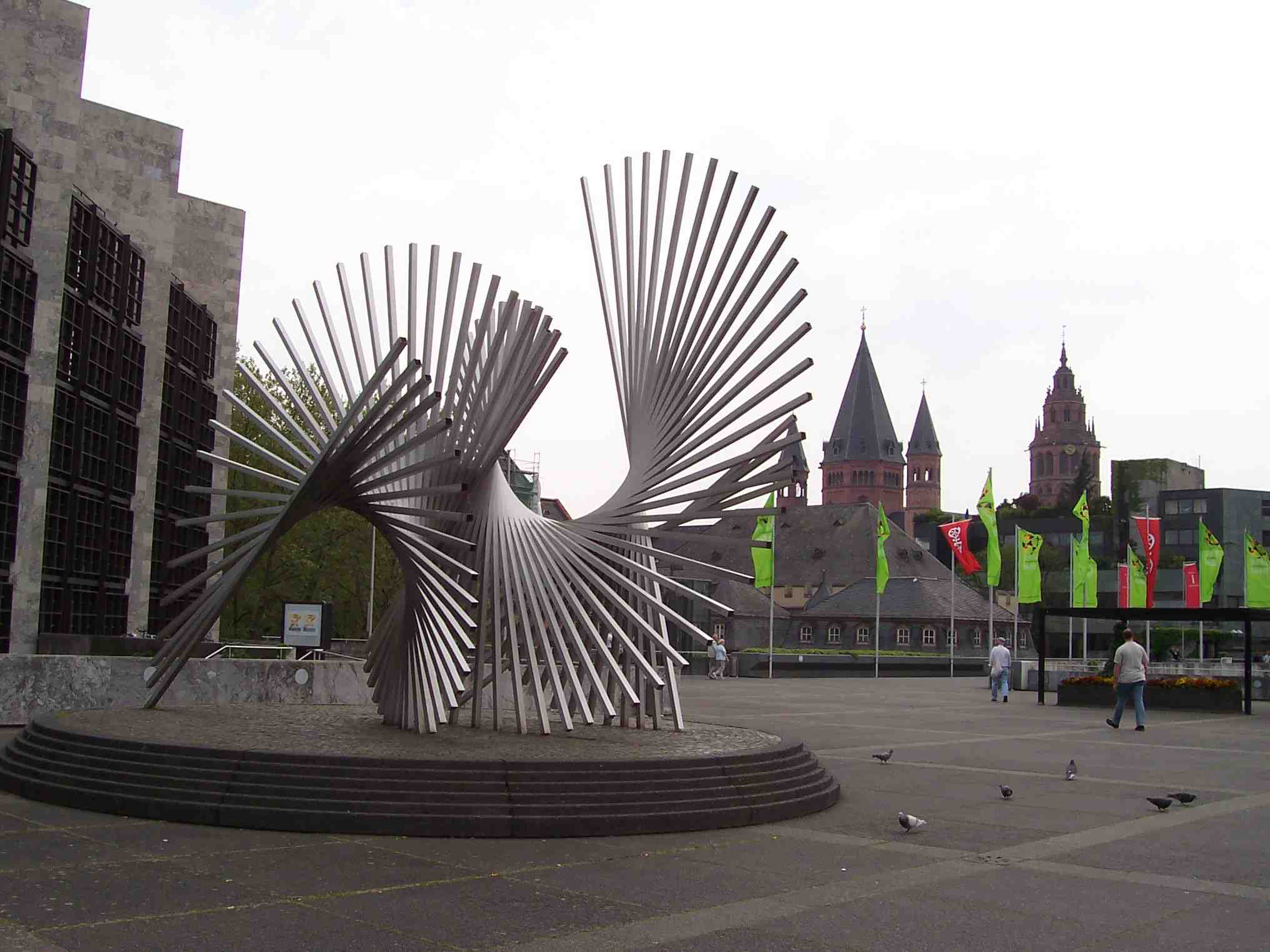 Jockel-Fuchs-Platz mit der Skulptur Lebenskraft von Andreu Alfaro aus der Partnerstadt Valencia aus dem Jahr 1979, welche dann im September 1982 vor dem Rathaus in Mainz aufgestellt wurde. Im Hintergrund der Mainzer Dom.